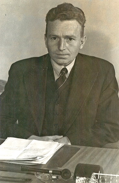 portrett, mann, høyesterettsdommer, sittende halvfigur ved skrivebord. Norges første sivilombudsmann, 1962-74.